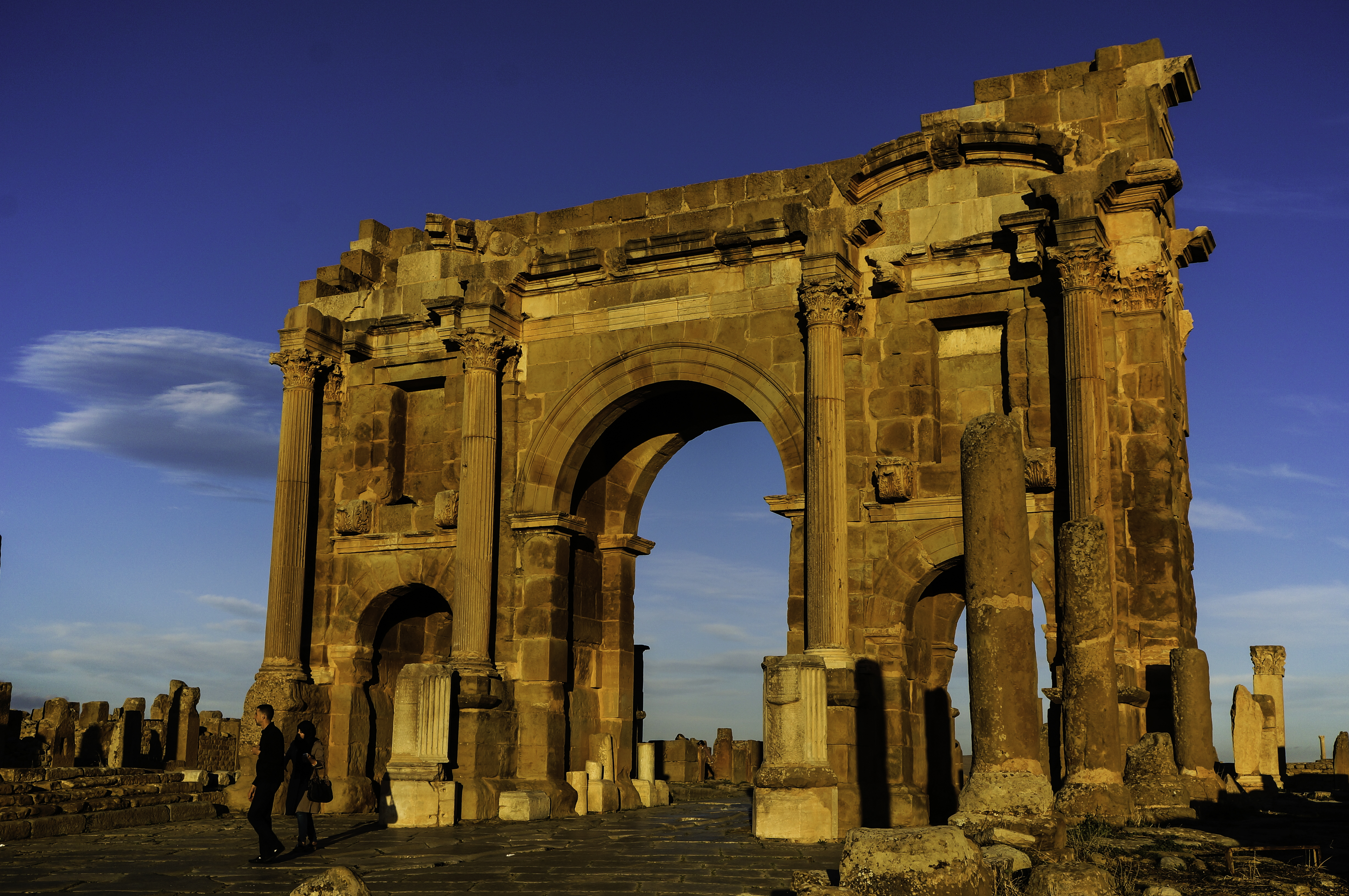 Timgad